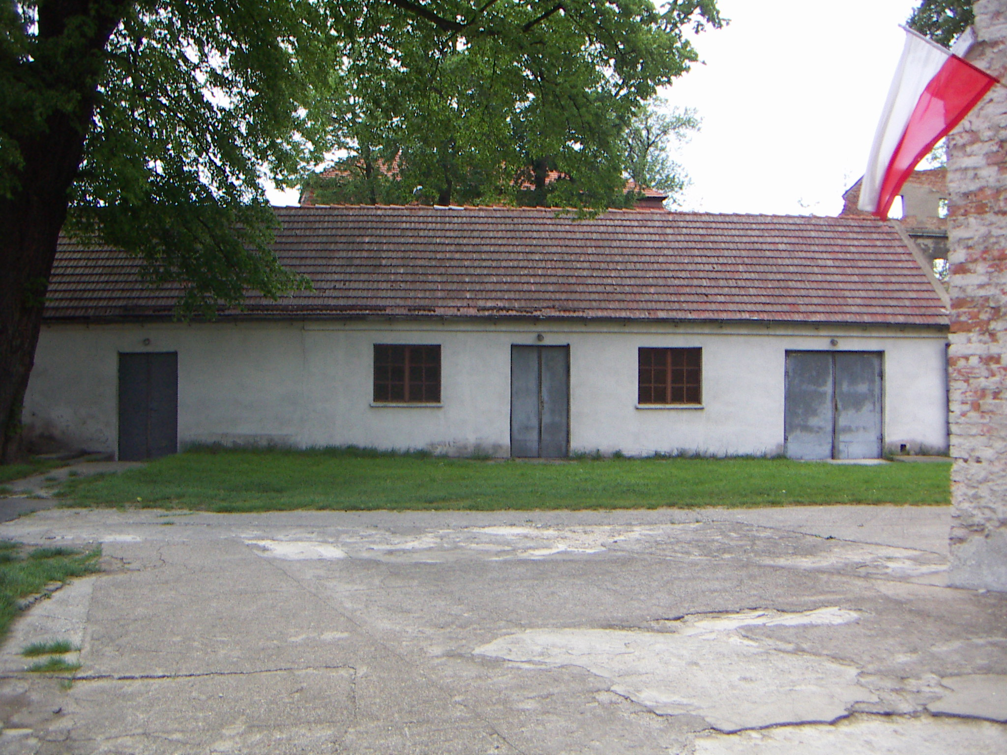 Kościół św. Marcina w Grębocicach- dom pogrzebowy